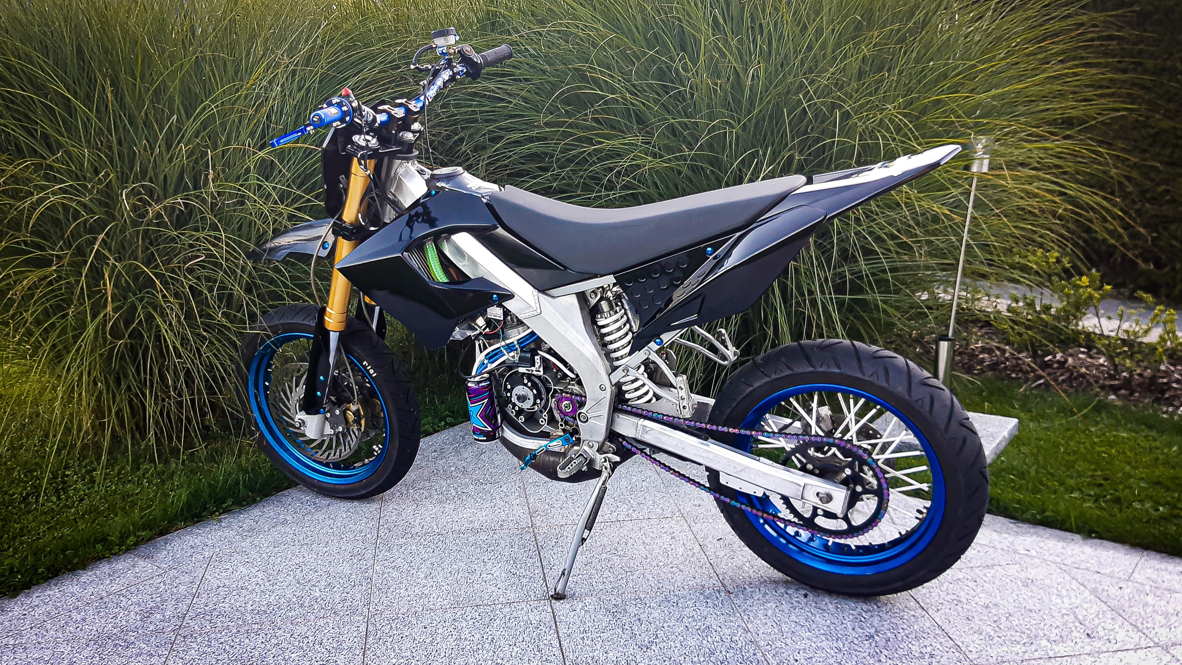 Derbi drd pro in Österreich